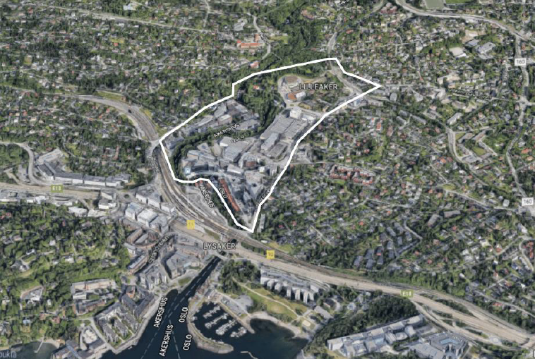 Området mellom Lilleaker og Lysaker som Mustad Eiendom eier (innringet) på begge sider av Lysakerelven.